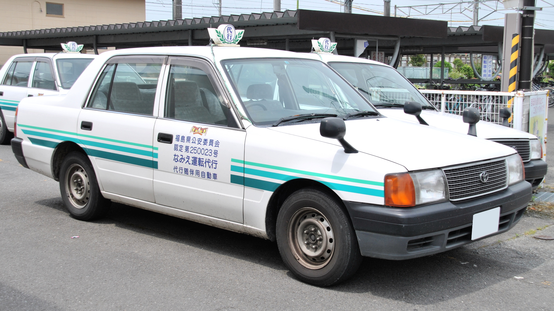 なみえ運転代行のトヨタ・コンフォート